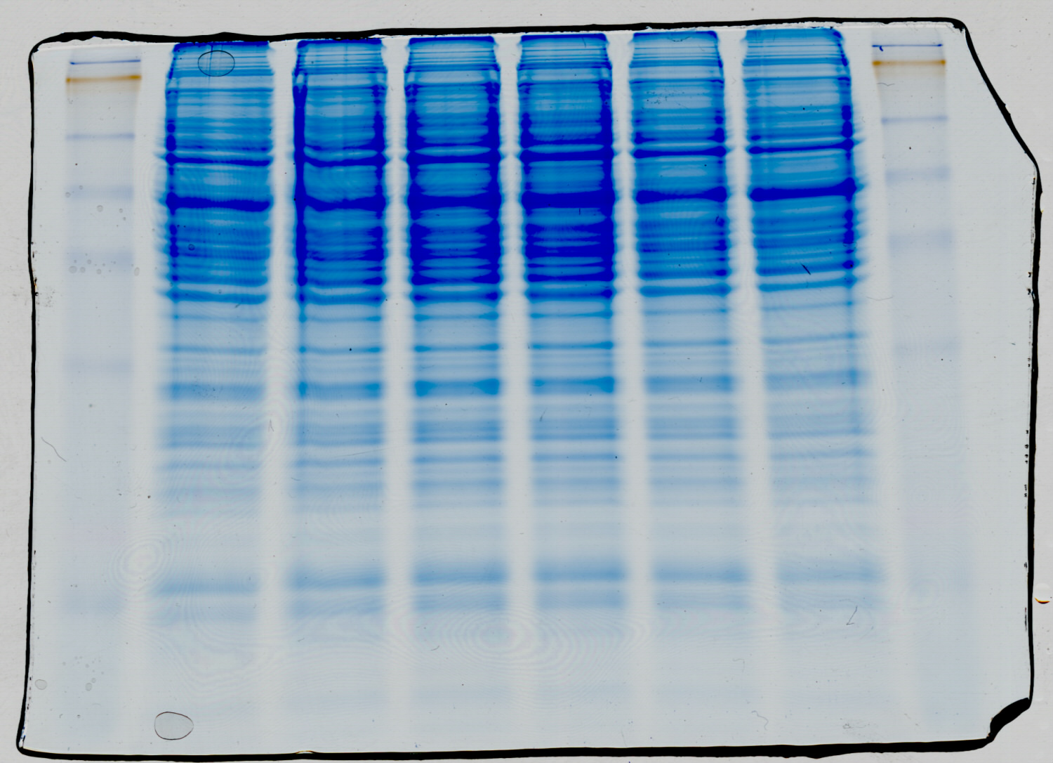 Foto de electroforesis en gel de poliacrilamida con dodecilsulfato